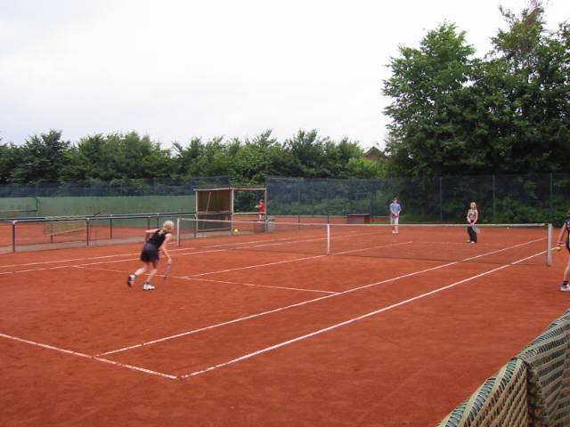 Tennisspiel selbstfotografiert, --SebastianWilken 22:59, 10. Mär 2005 (CET)